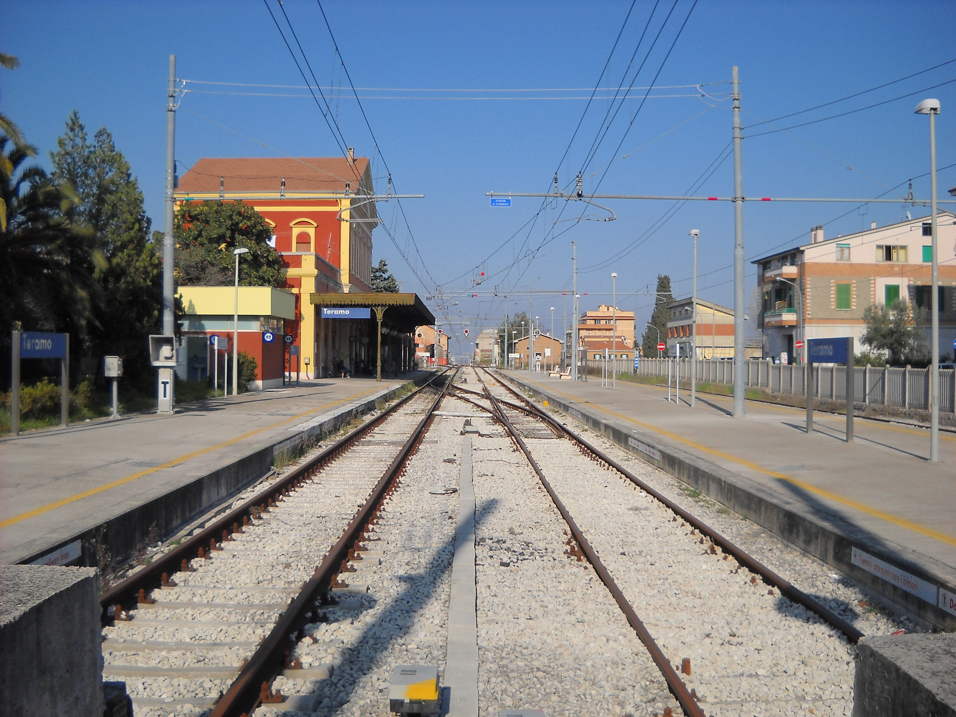 I primi due binari della Stazione di Teramo (il tracciato del terzo binario, oggi dismesso, si intravede sulla destra)